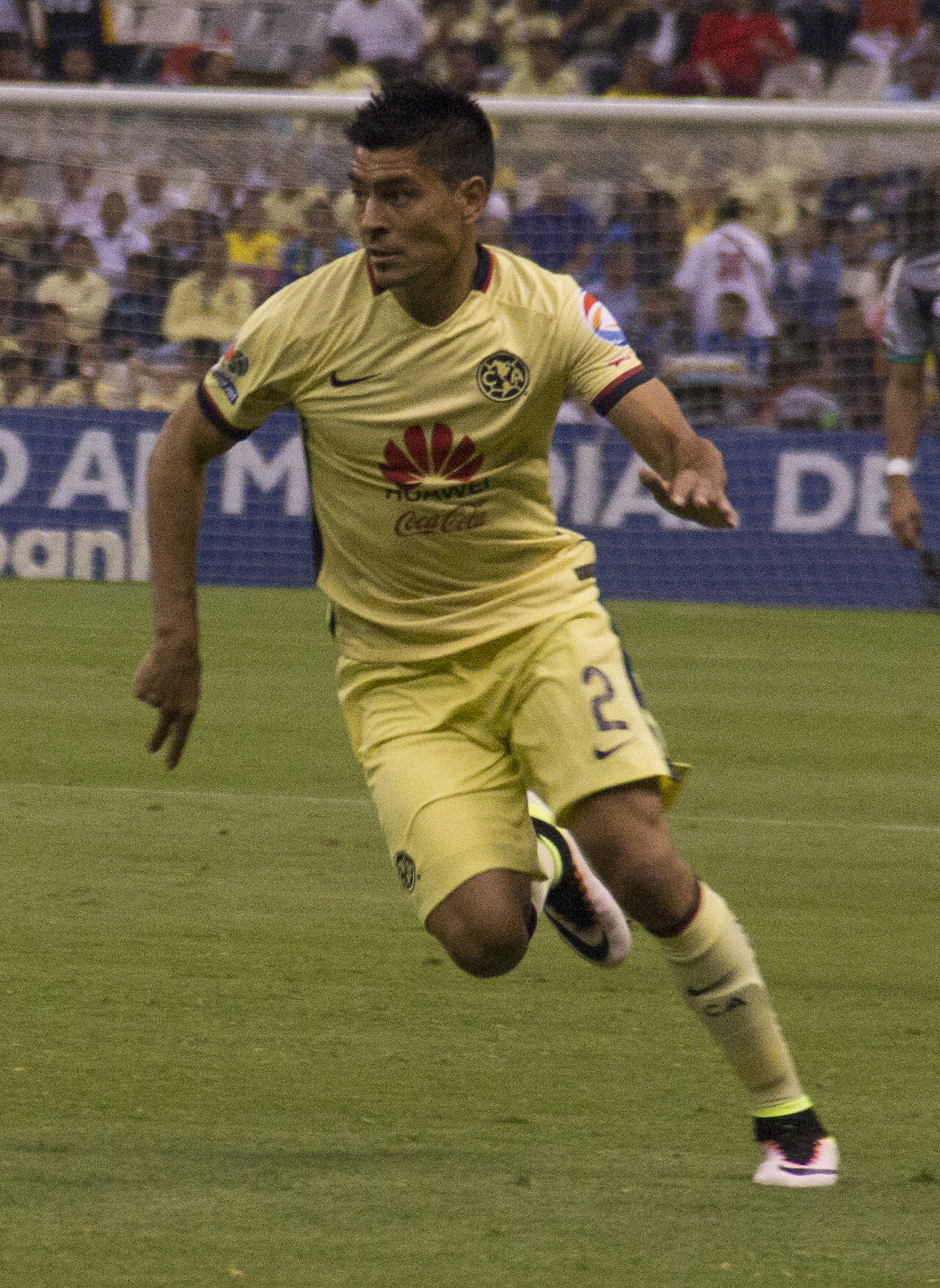 América vs Santos